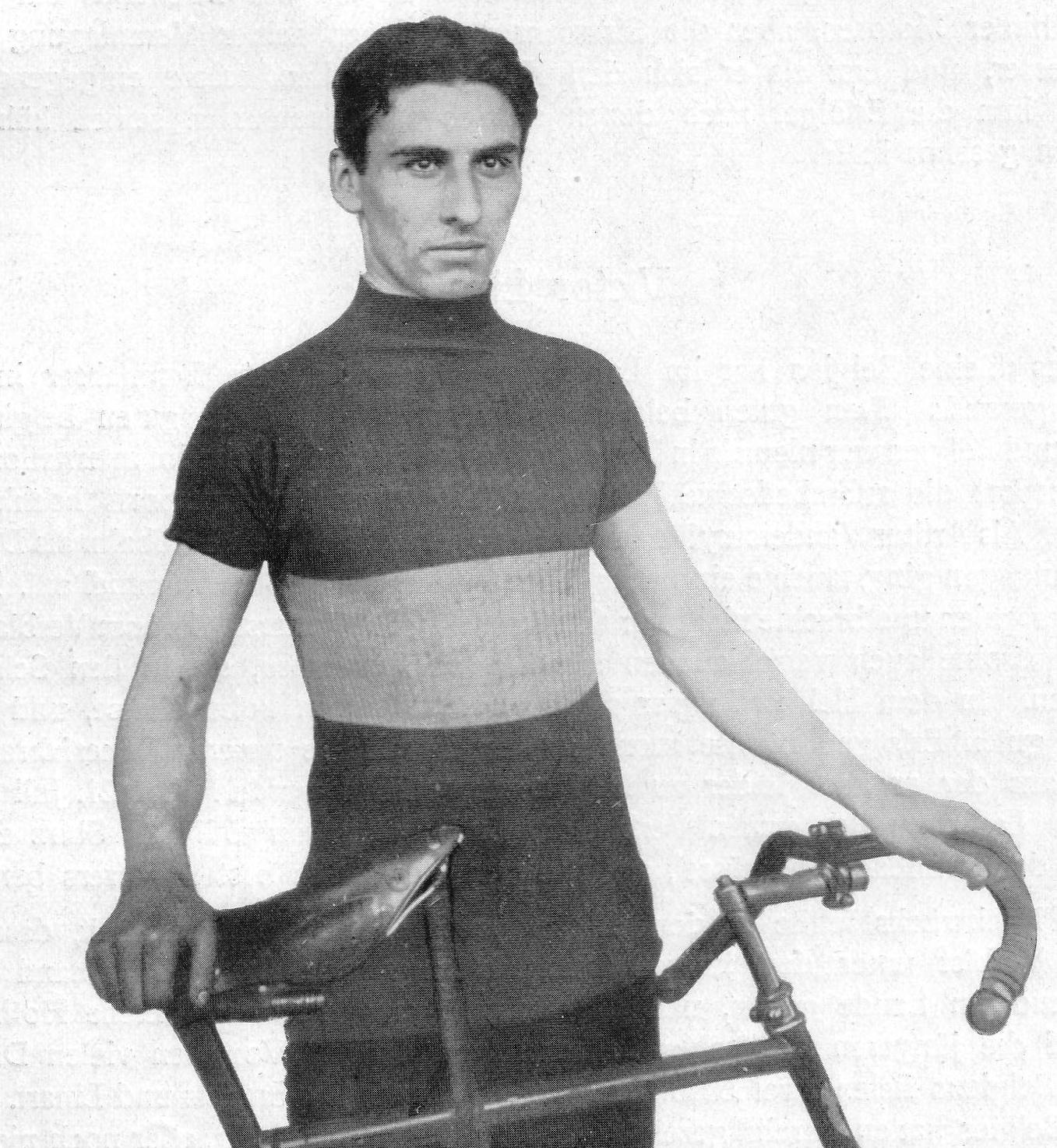 Victor Linart, französischer Radrennfahrer